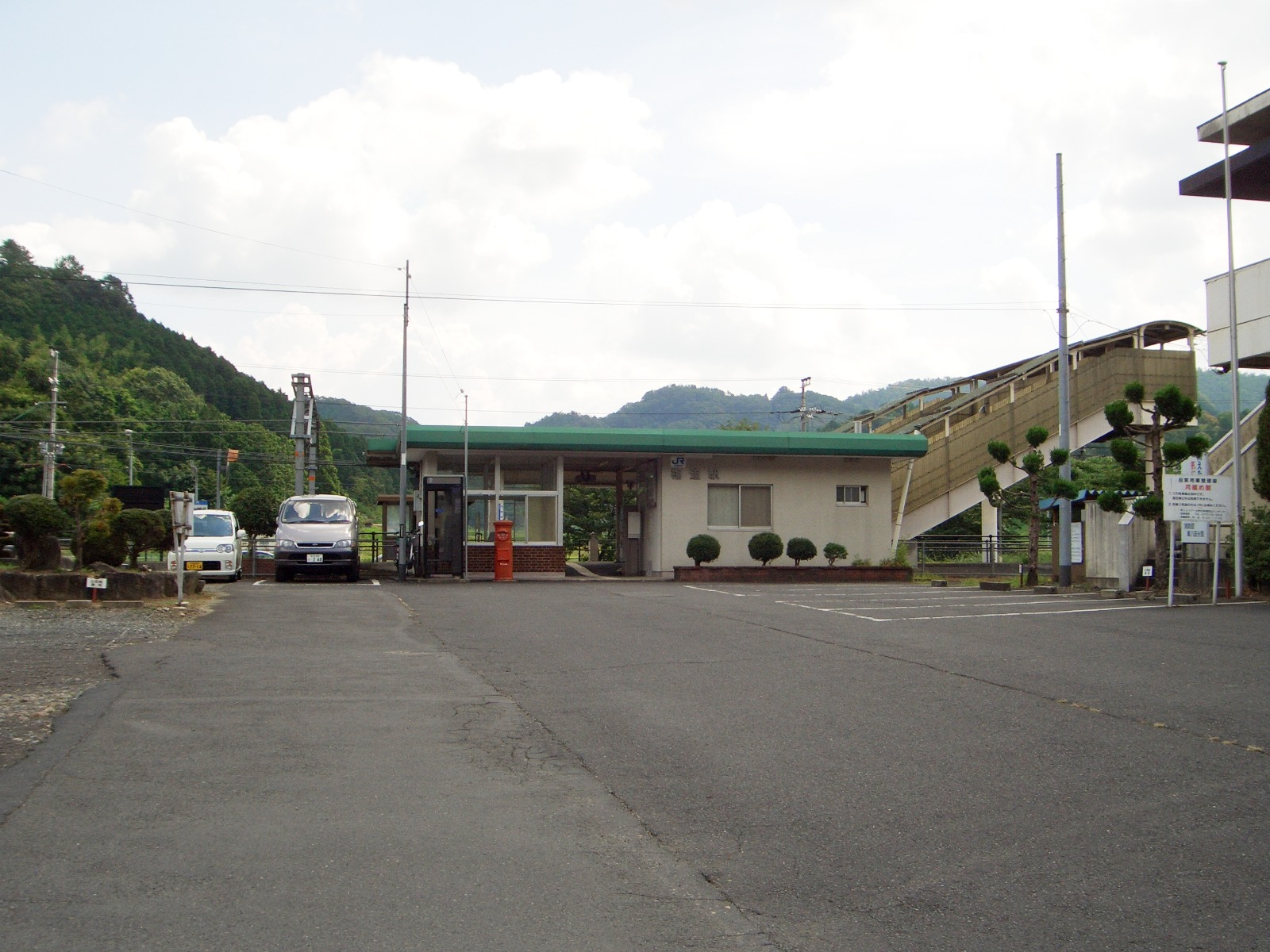 西日本旅客鉄道（JR西日本）舞鶴線梅迫駅。